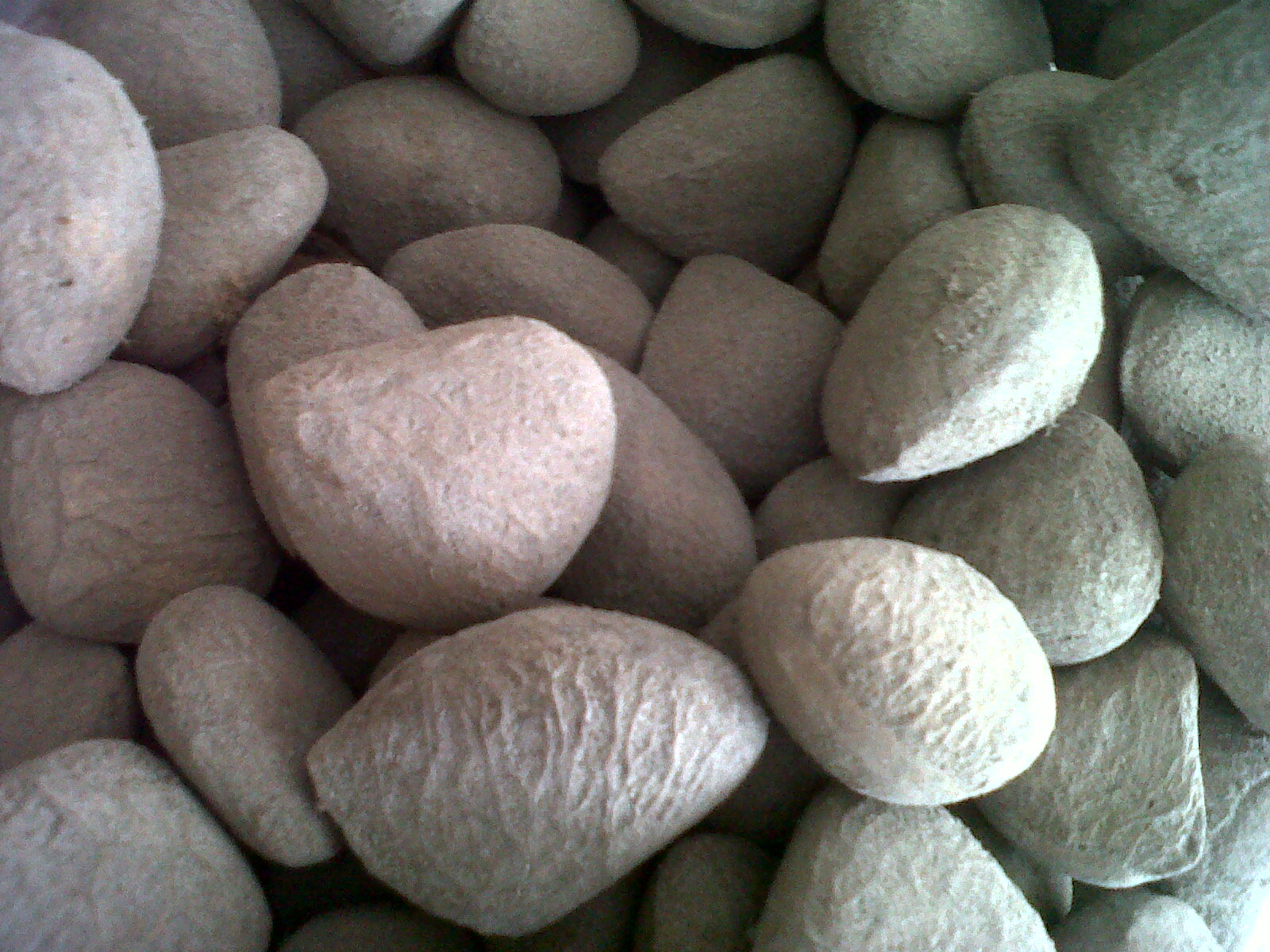 Kluwek